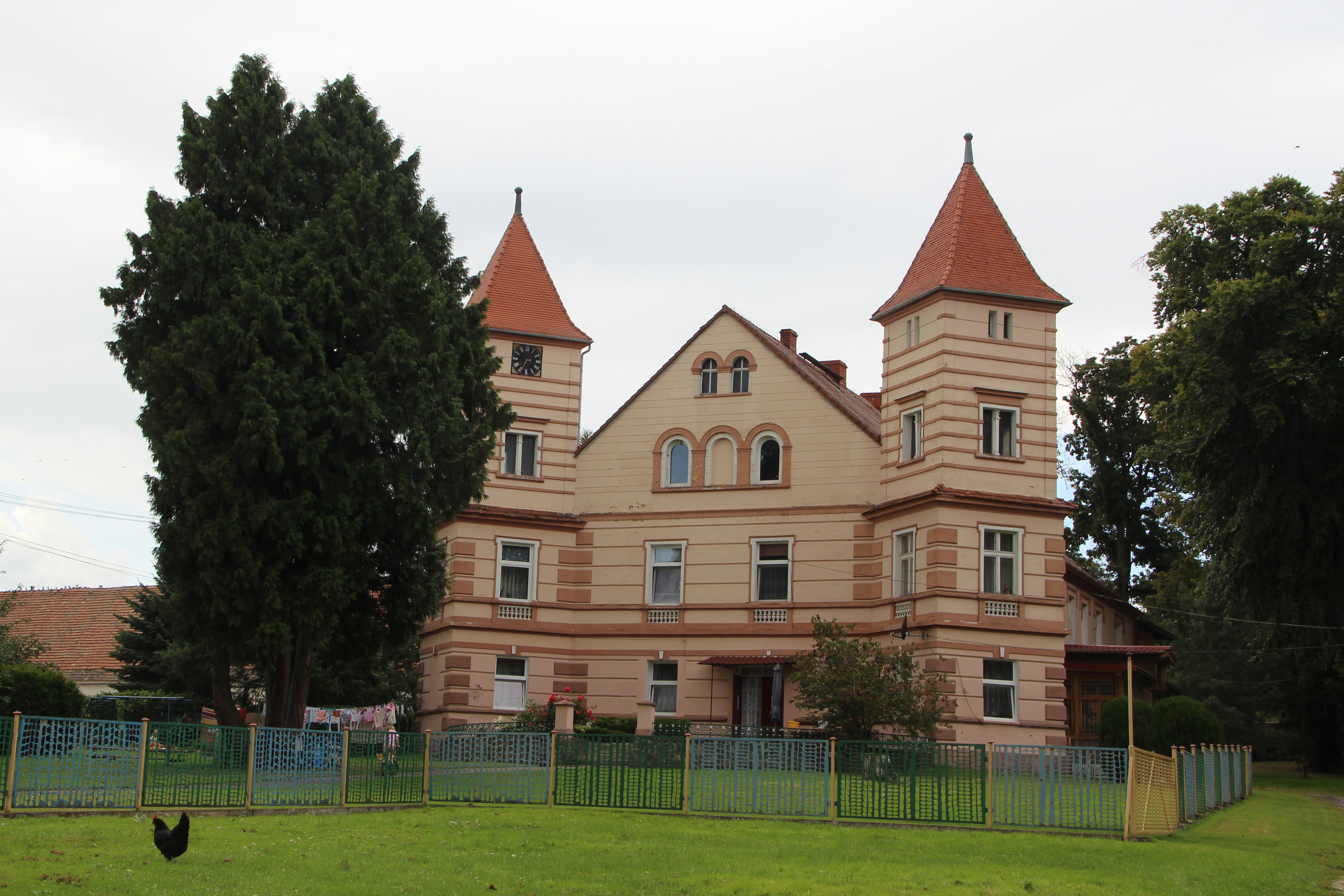 Goworowice – wieś w Polsce położona w województwie opolskim, w powiecie nyskim, w gminie Kamiennik.